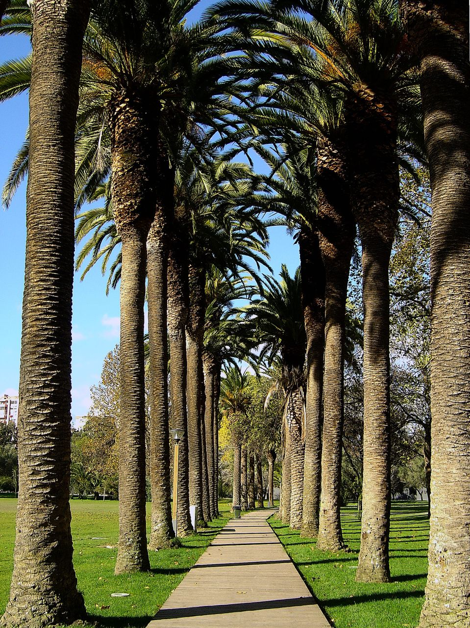 Qta. das Conchas - Lisboa